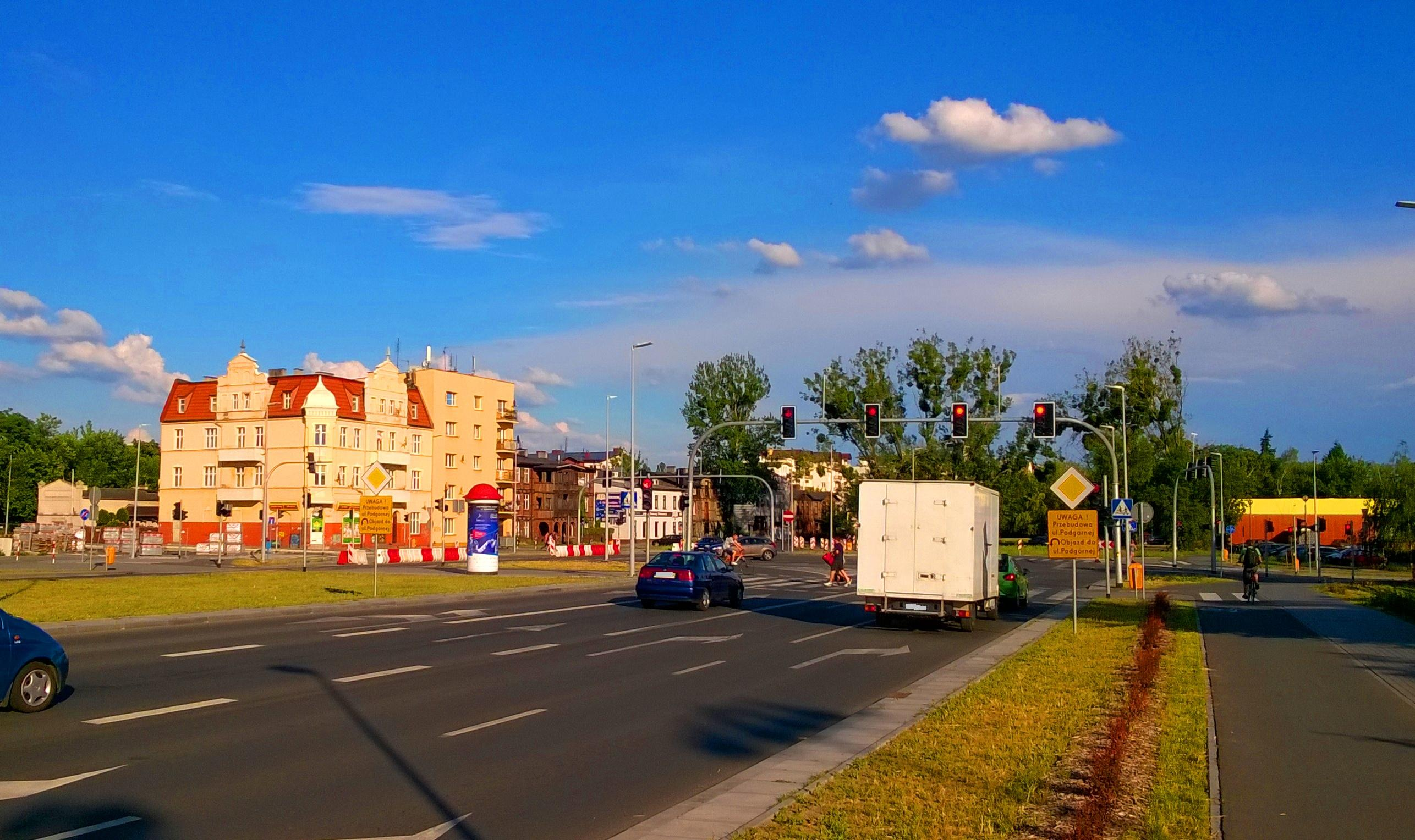 Trasa Staromostowa w Toruniu1